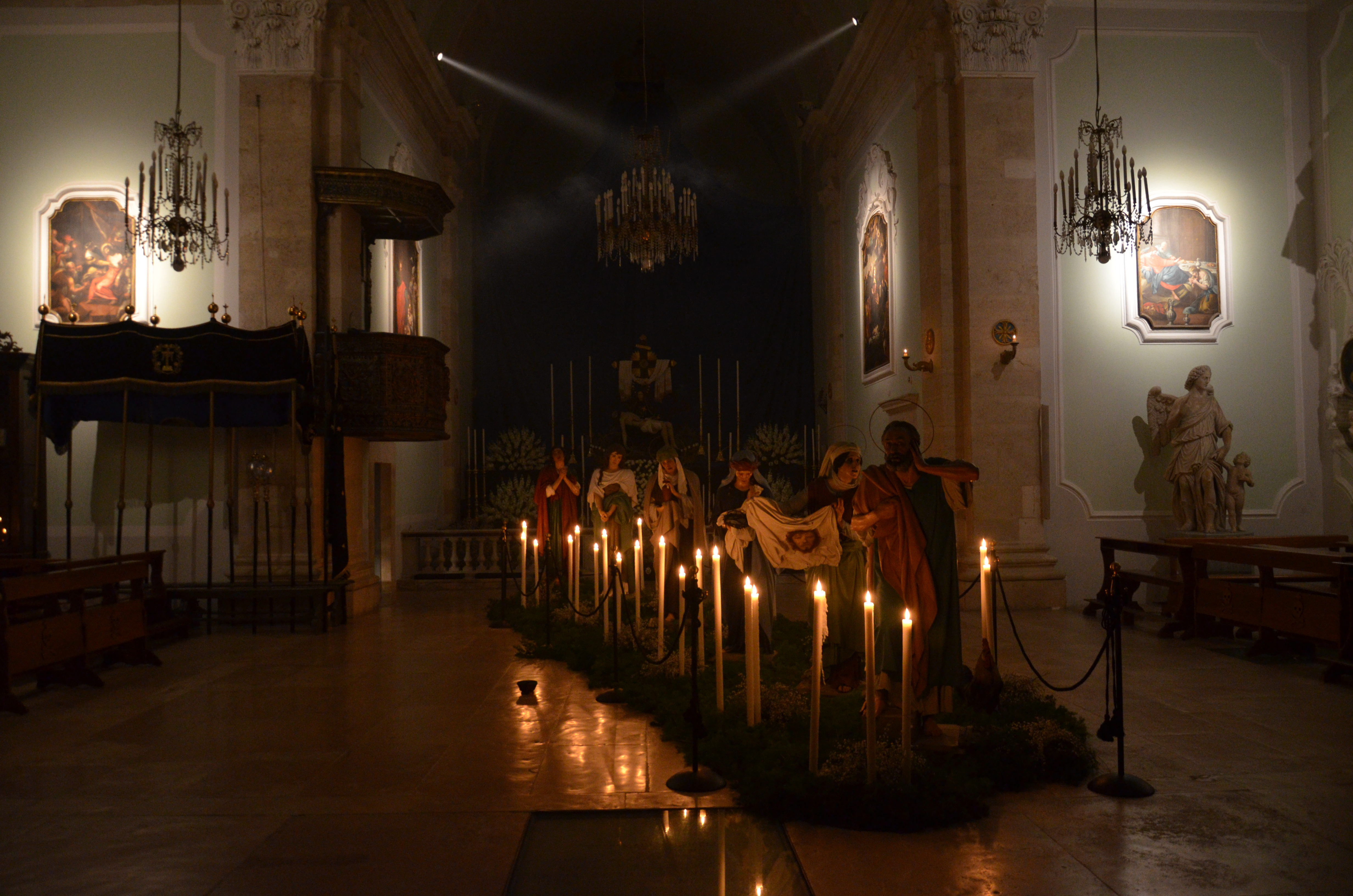 Reposizione (anche detto "sepolcro")